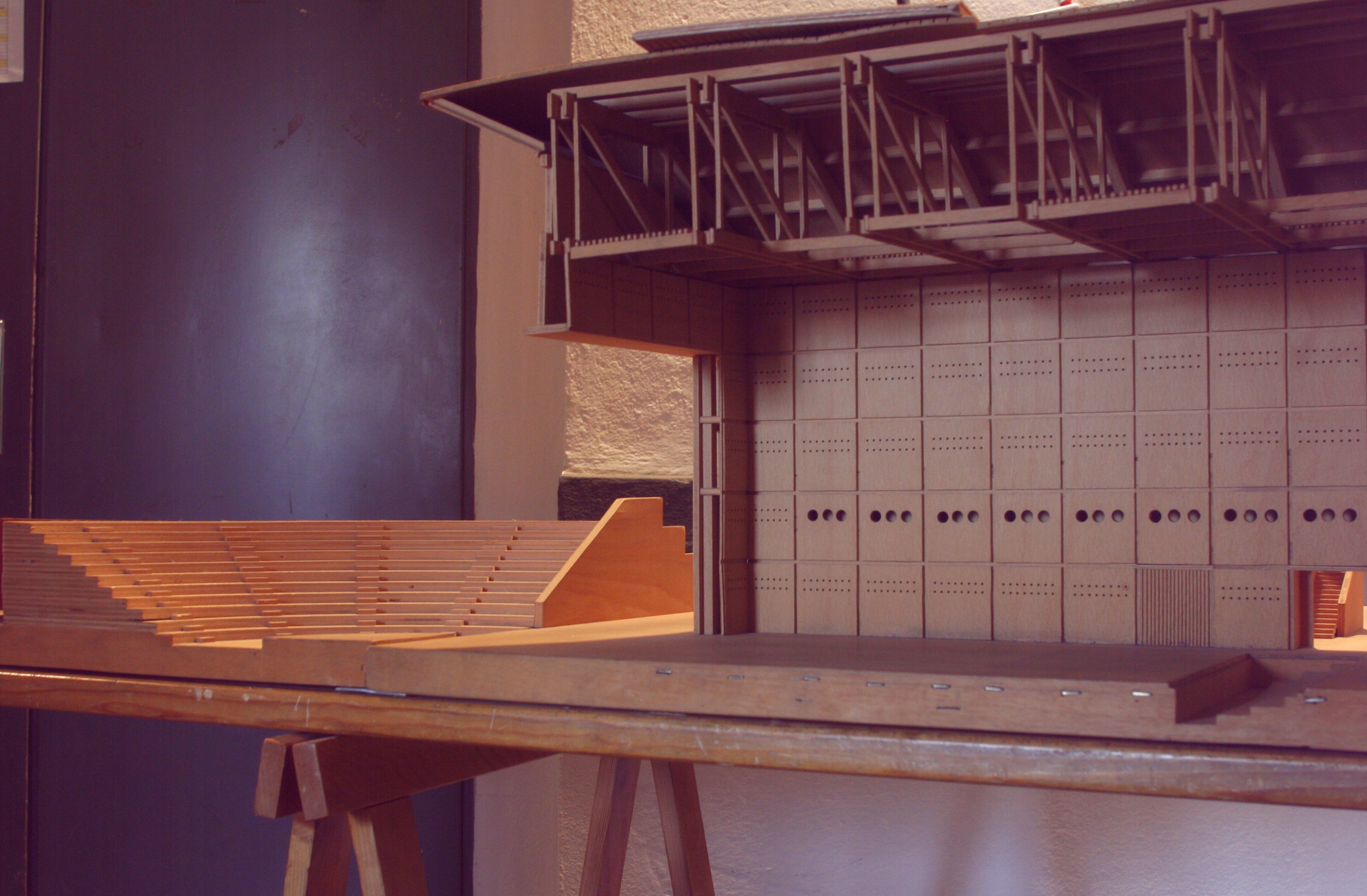 Idea iniziale teatro Era - esposta presso il Comune di Pontedera